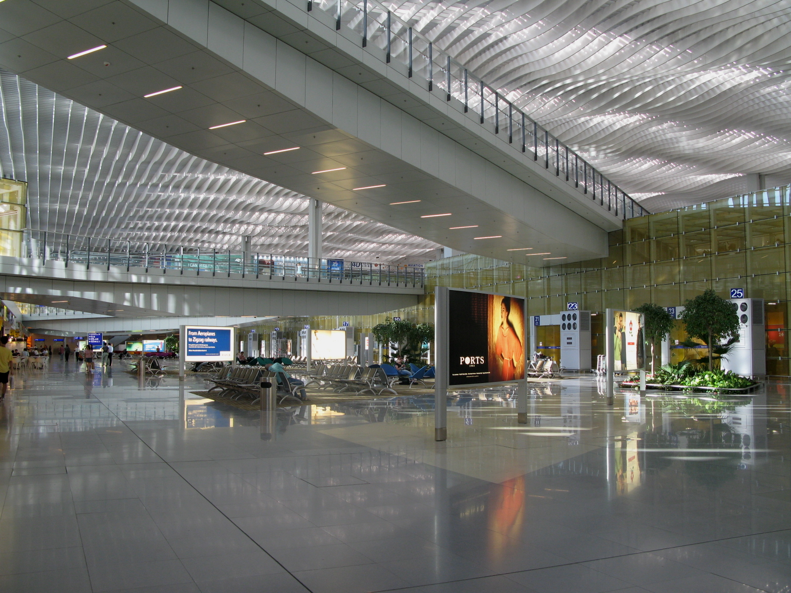 Skyplaza 翔天廊過境巴士大堂